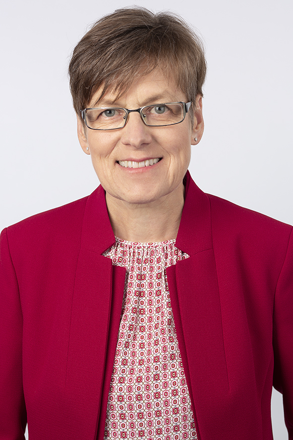 Barbara Eschen, 2018